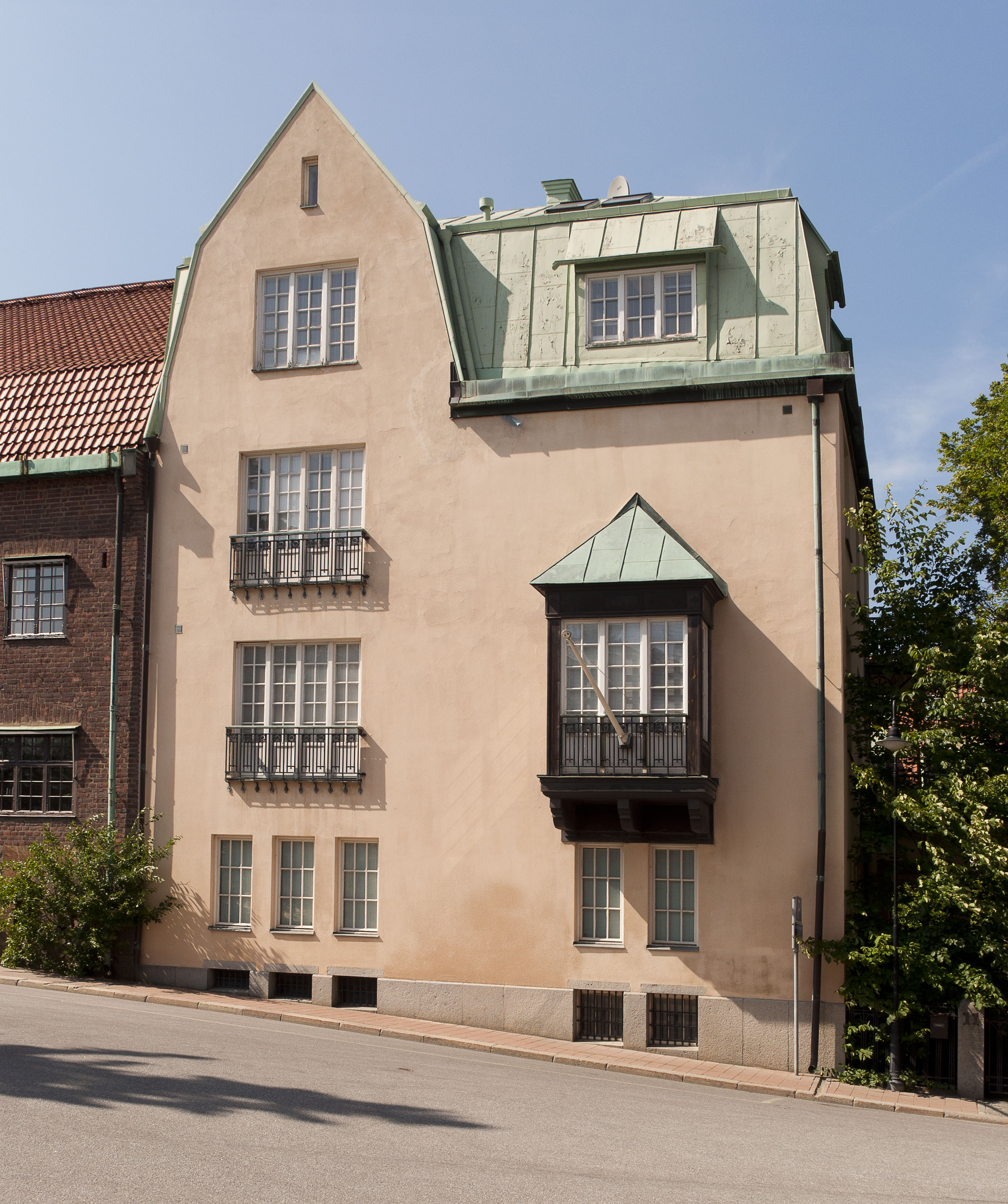 Tyrgatan 11 (Tofslärkan 10): Byggnadsår 1909-12, arkitekter Hagström & Ekman, byggherre och byggmästare R Edblom.